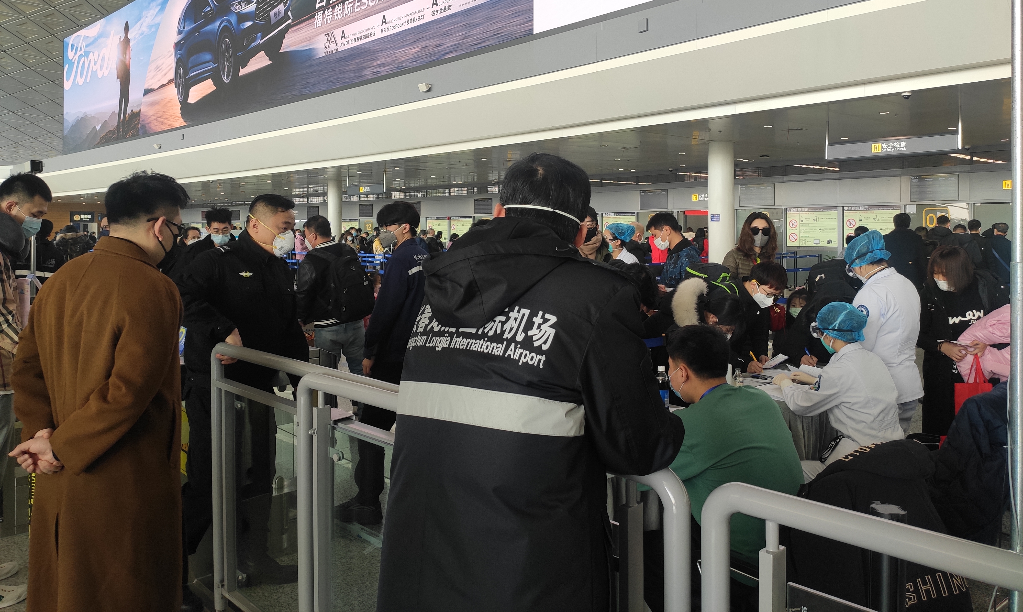 中文（中国大陆）: 长春龙嘉国际机场T2航站楼国内出发安检区。由于北京两机场于25日宣布对抵京旅客实施体温检测，龙嘉机场在安检区内设置了检测区，对进京旅客进行体温检测。